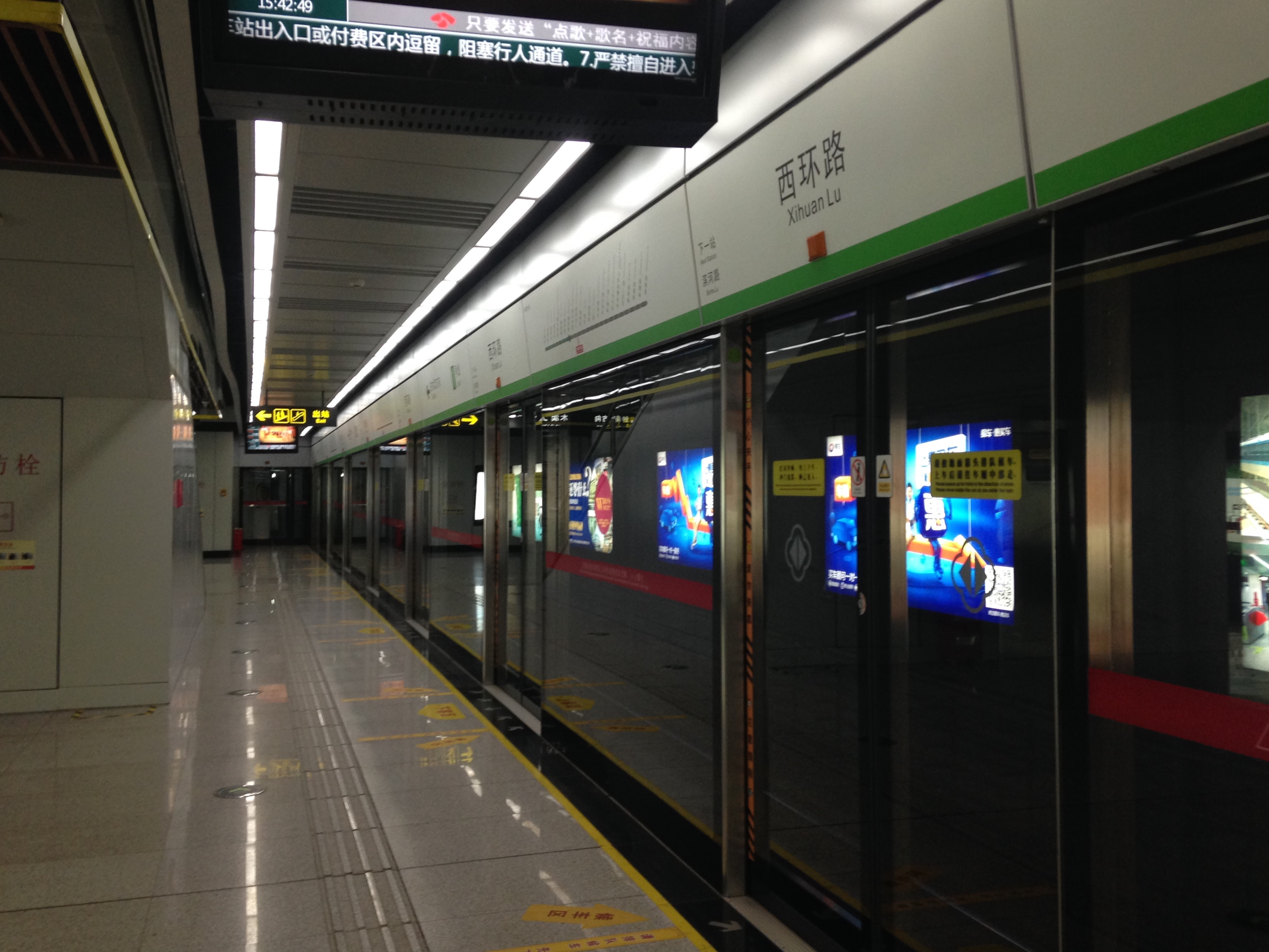 西環路駅のホーム